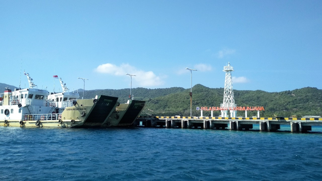 Dua kapal patroli laut bersandar di Pelabuhan Karimunjawa